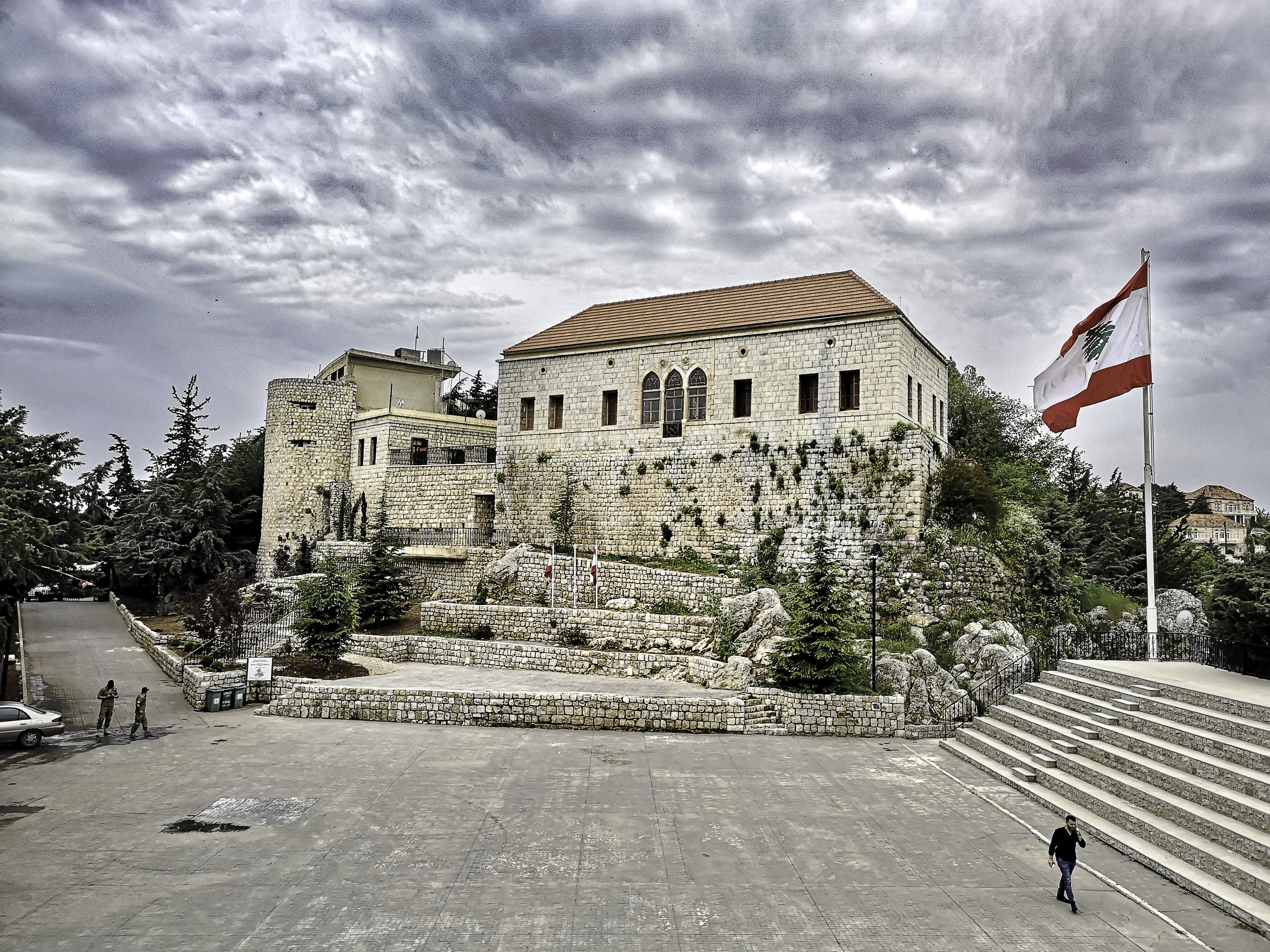 De citadel van Rashaya